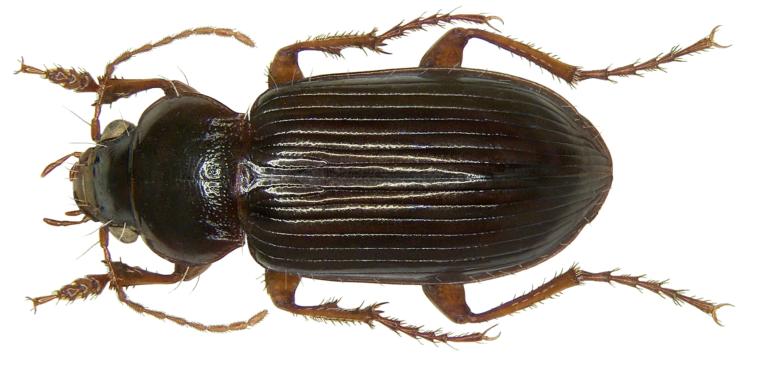 Familie: Carabidae Größe: 10-13 mm Verbreitung: Europa bis Kasachstan und der Mongolei Ökologie: auf salzigen Böden, besonders an der Meeresküste Fundort: Holland, Winterswijk leg.det. W.Veldkamp, 1981 Foto: U.Schmidt, 2008